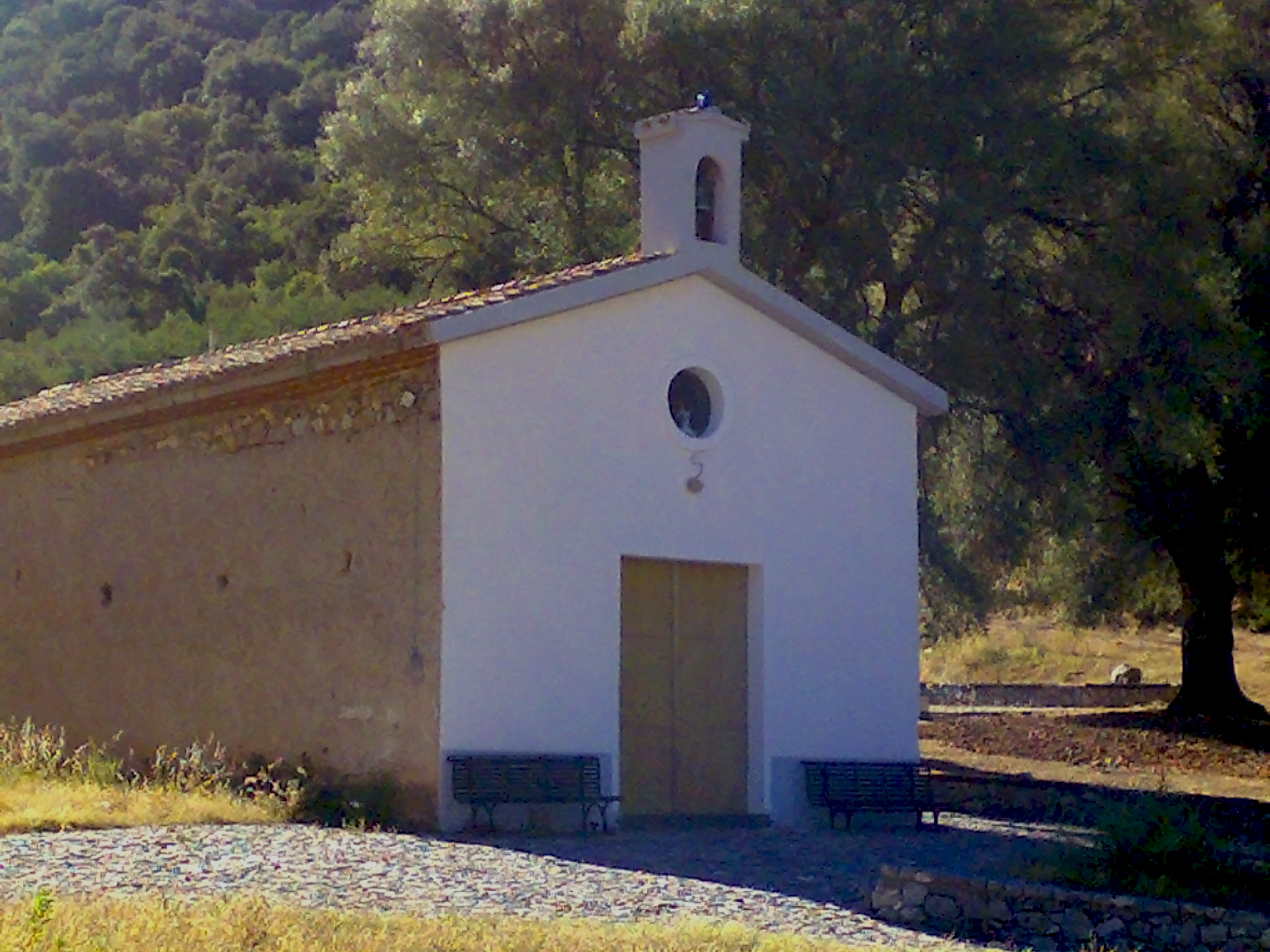 Chiesa Di San Giovanni Presso La Grotta Ononima.